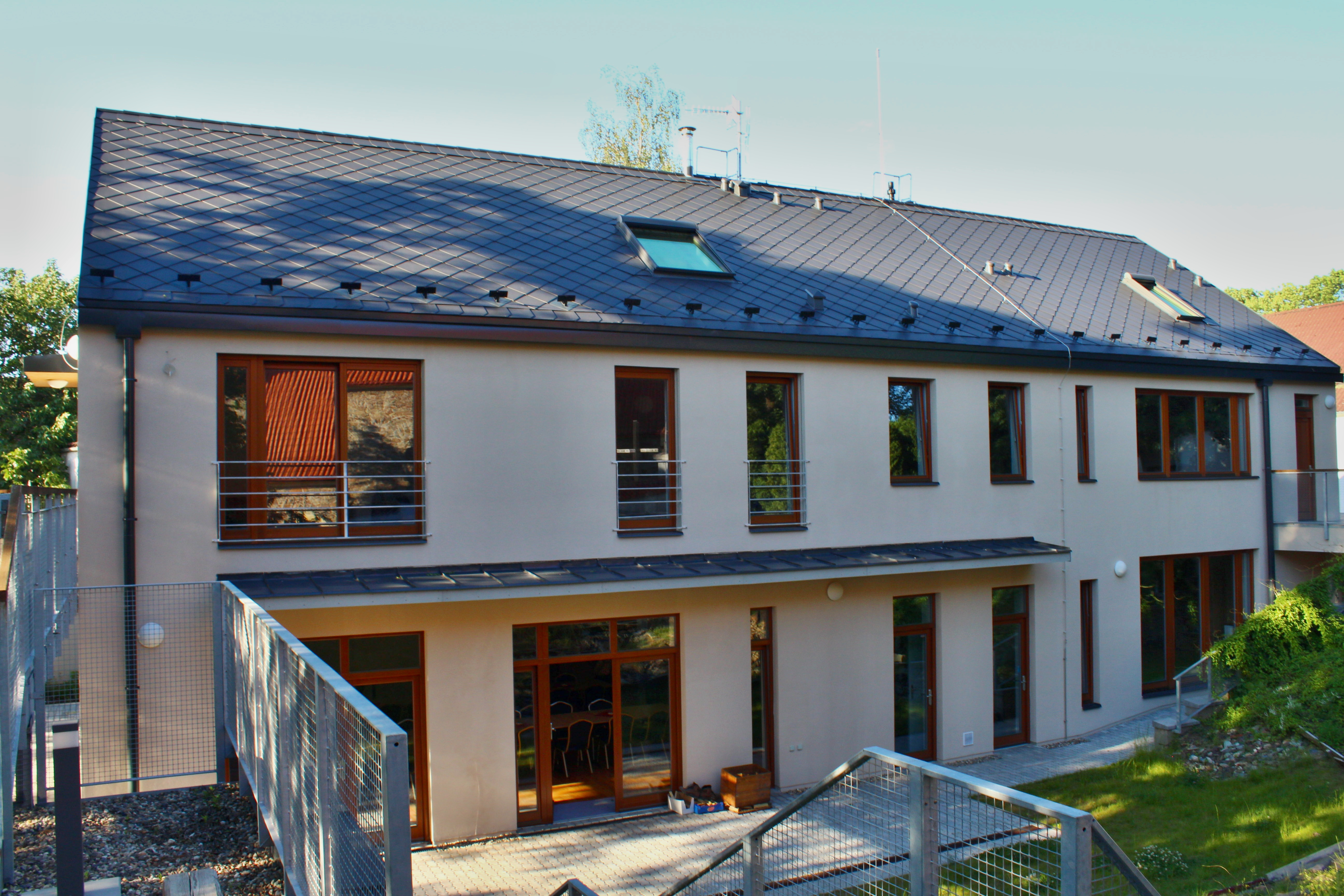 Praha 10-Petrovice, fara u kostela sv. Jakuba Staršího